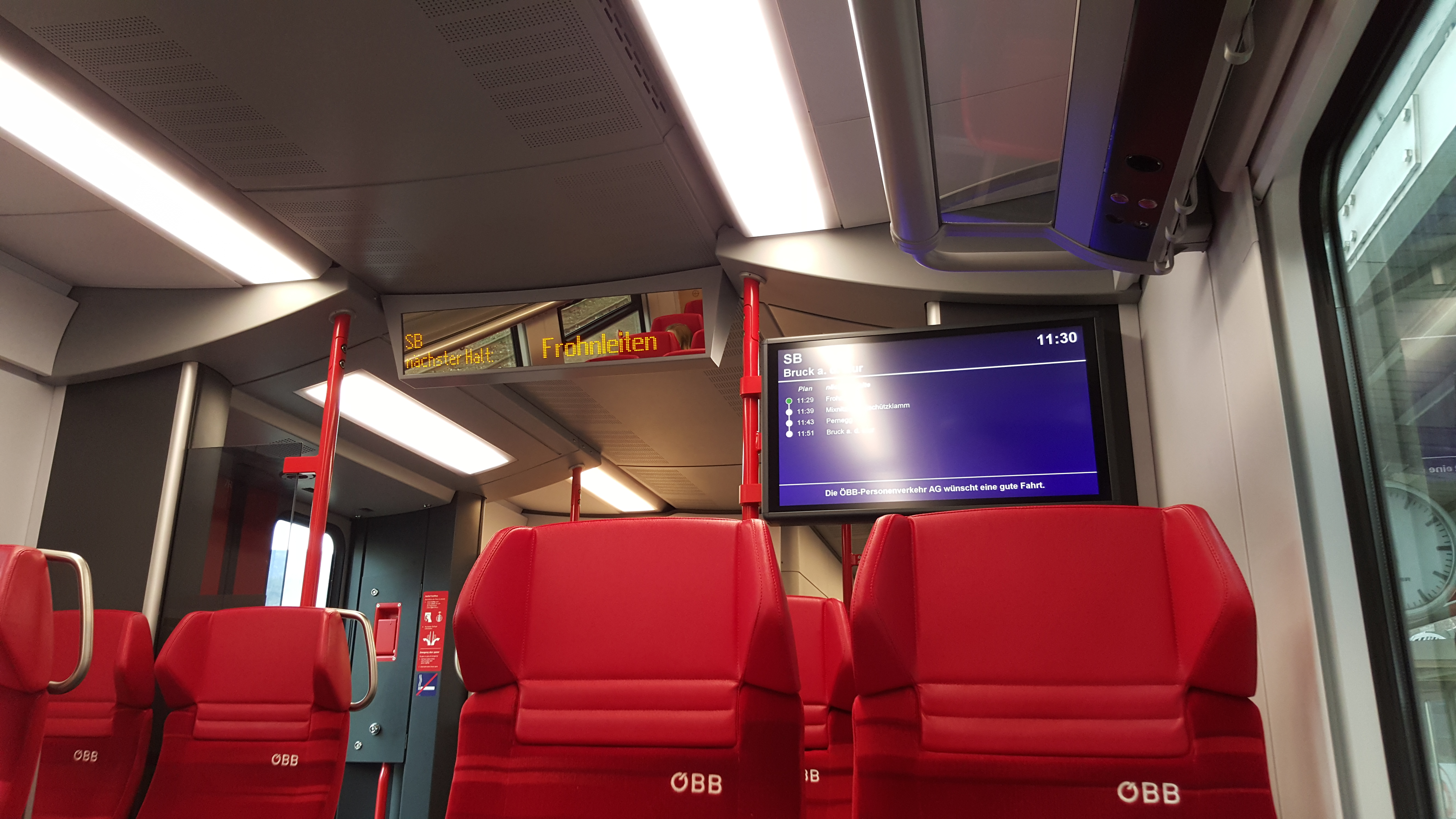 Innenansicht des ÖBB Desiro MLs im Bahnhof Frohnleiten